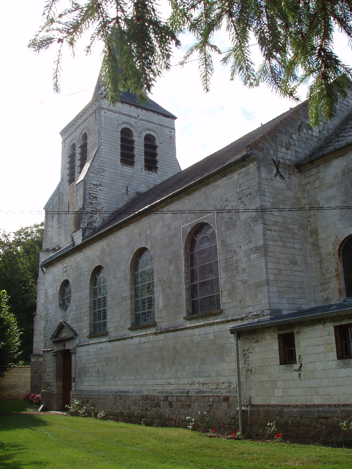 Commune française de Noyelle-Vion dans le département du Pas-de-Calais en France - Église